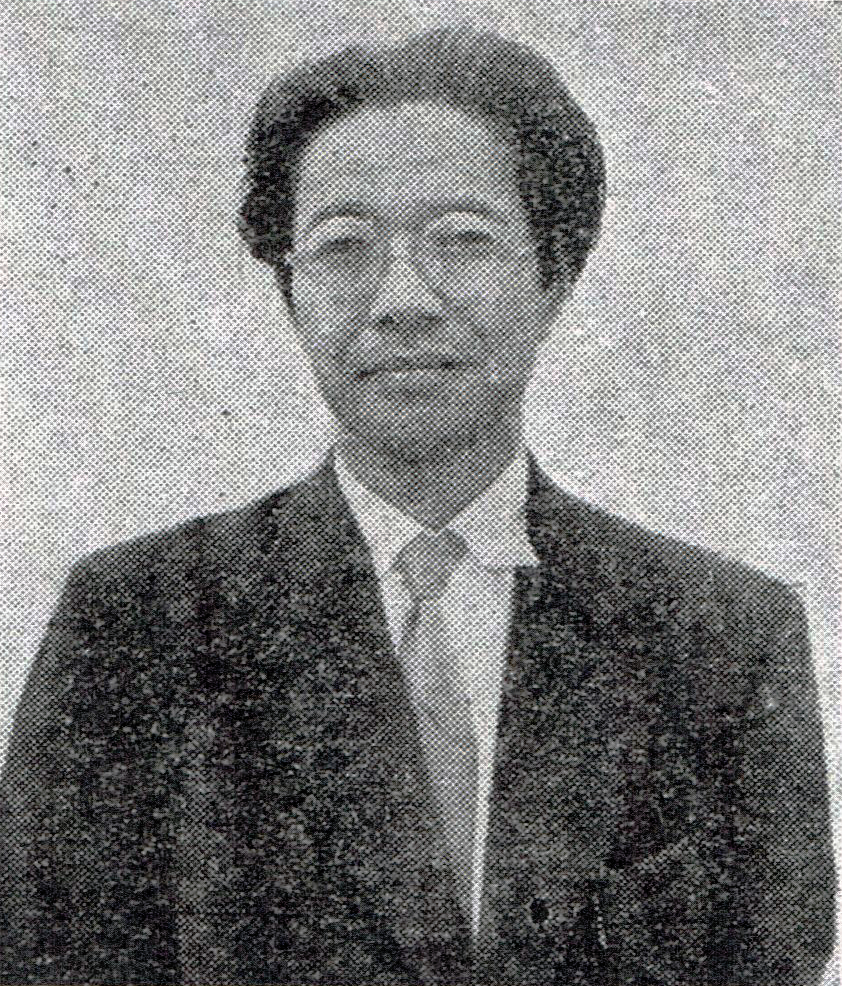 『逓信協会雑誌』8月号(1961年)、「逓信出身のエッセイスト・クラブ受賞者 宮本常一」より宮本常一